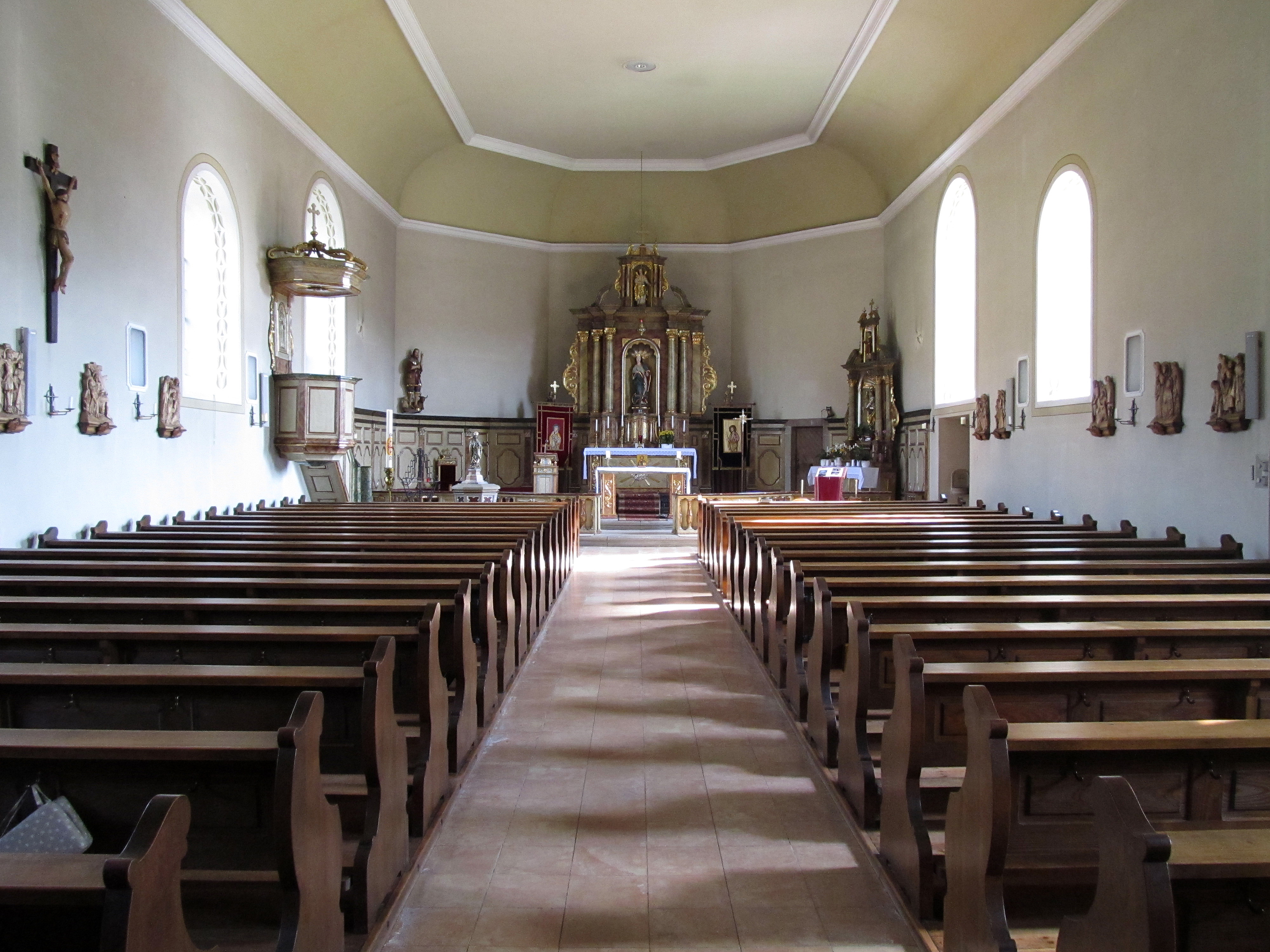 Blick ins Innere der katholischen Pfarrkirche St. Margaretha in Bebelsheim, Gemeinde Mandelbachtal, Saarland